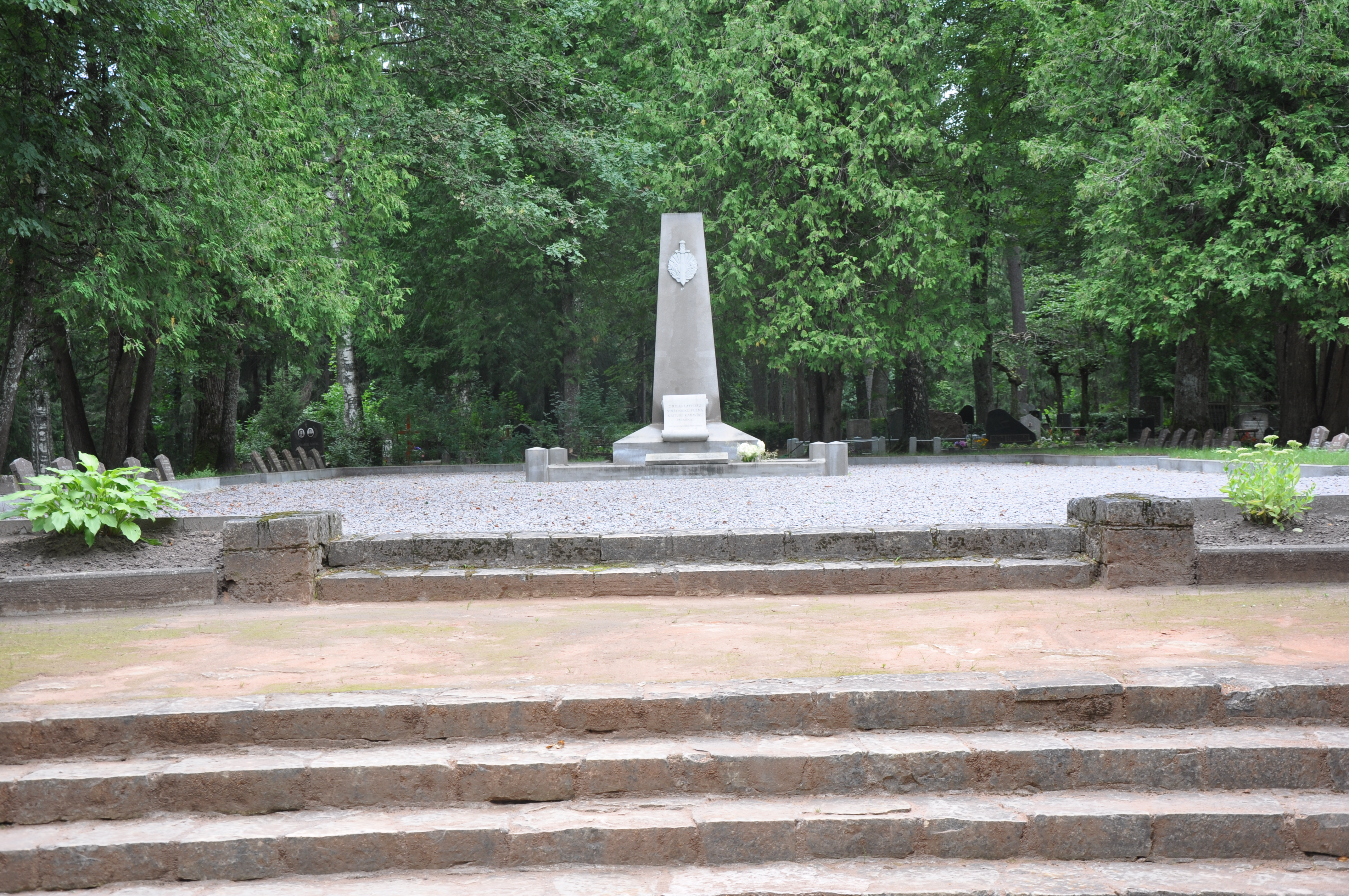 Brāļu kapi Ogrē (WWI, WWII), Ogre, Latvia